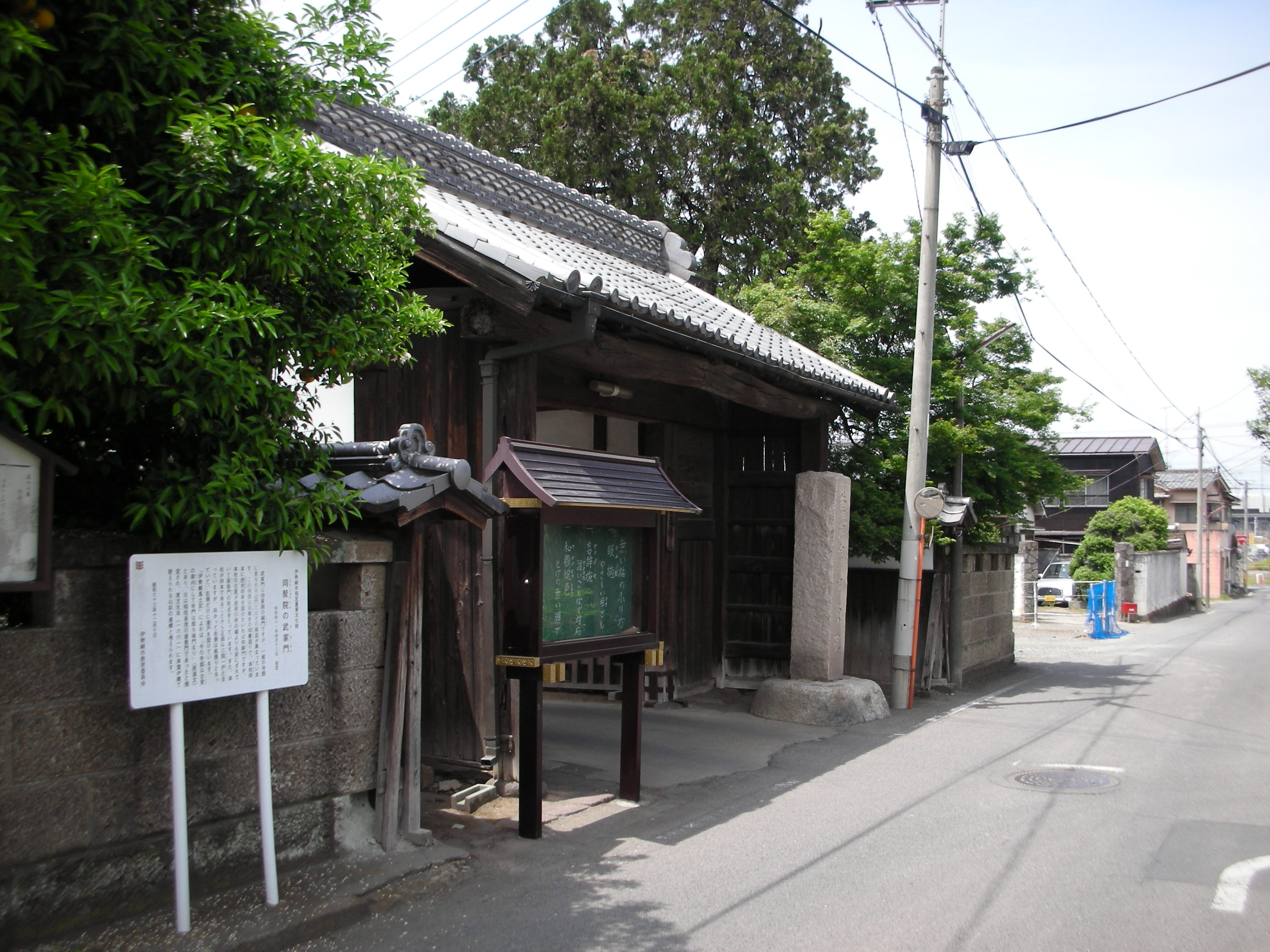 旧伊勢崎陣屋棟門の外観